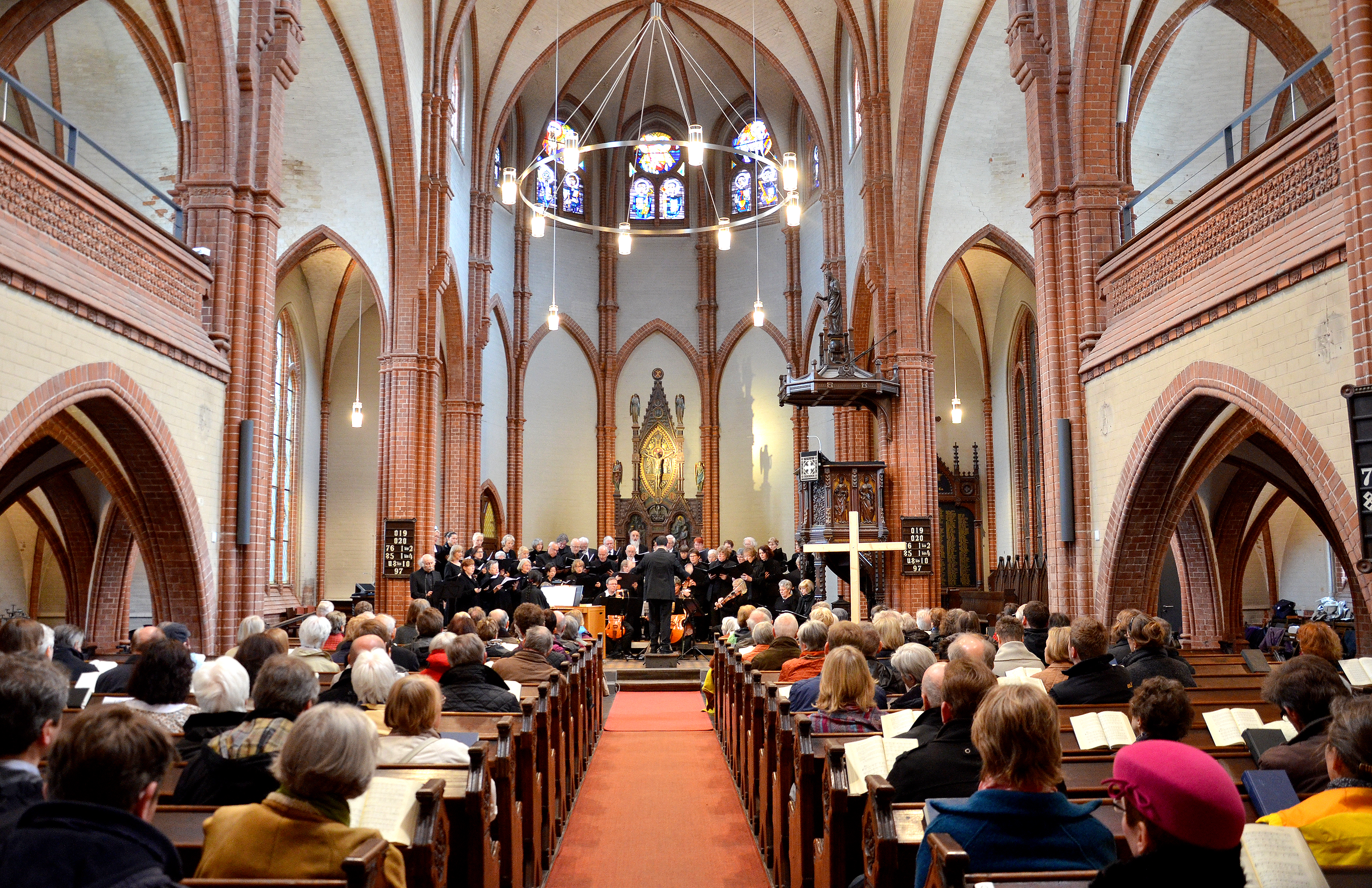 Am Karfreitag 2014 führte der Apostelchor mit dem Wiliam-Byrd-Ensemble und Erwin Schütterle (Rezitation) unter der Gesamtleitung von Andreas Schmidt-Adolf in der Apostelkirche in Hannover die Johannes-Passion des Komponisten Heinrich Schütz auf ...